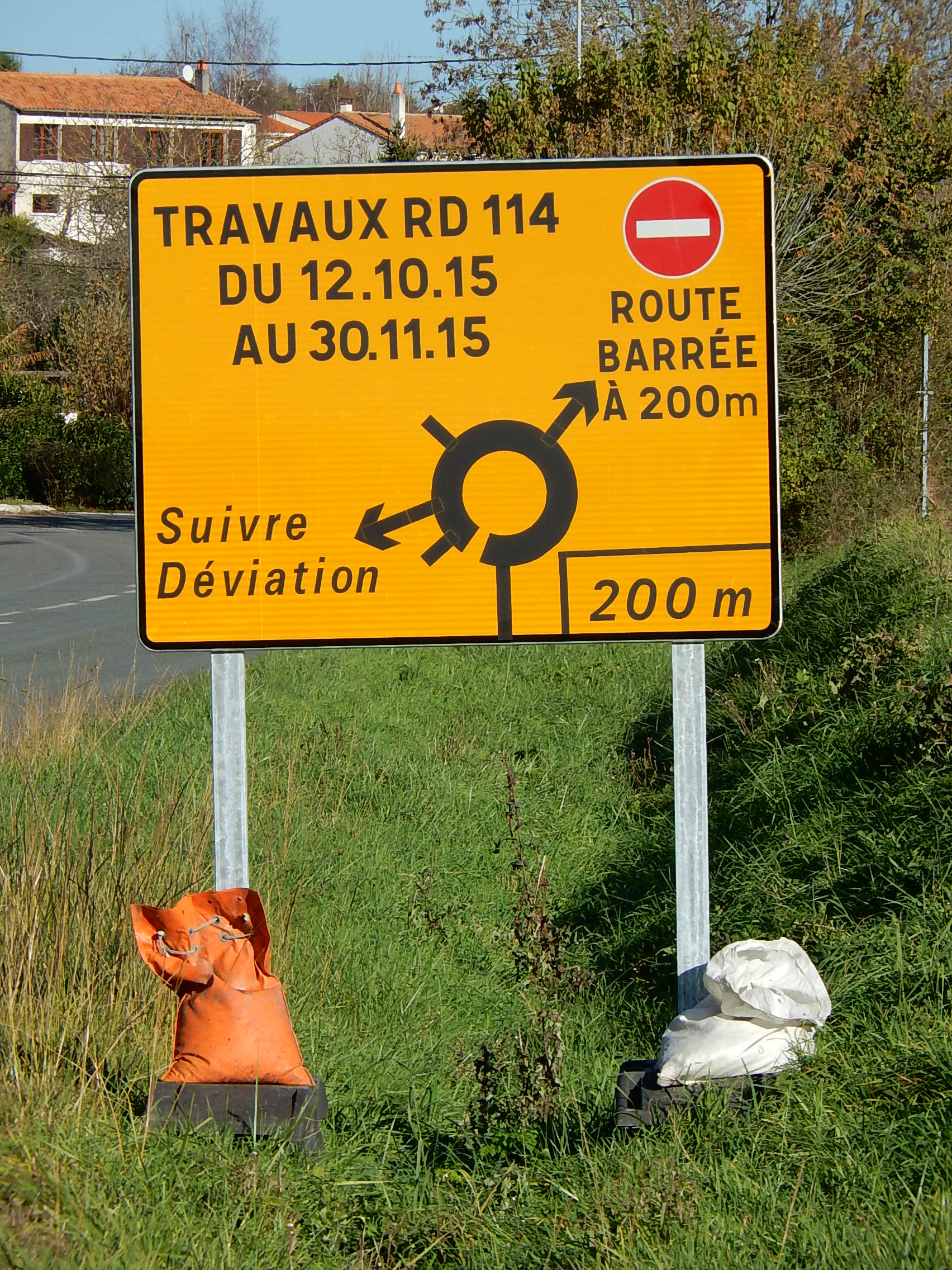 Un panneau temporaire de présignalisation de déviation sur un carrefour giratoire, implanté à Saintes pendant les travaux d'aménagement du « carrefour des pompiers ».